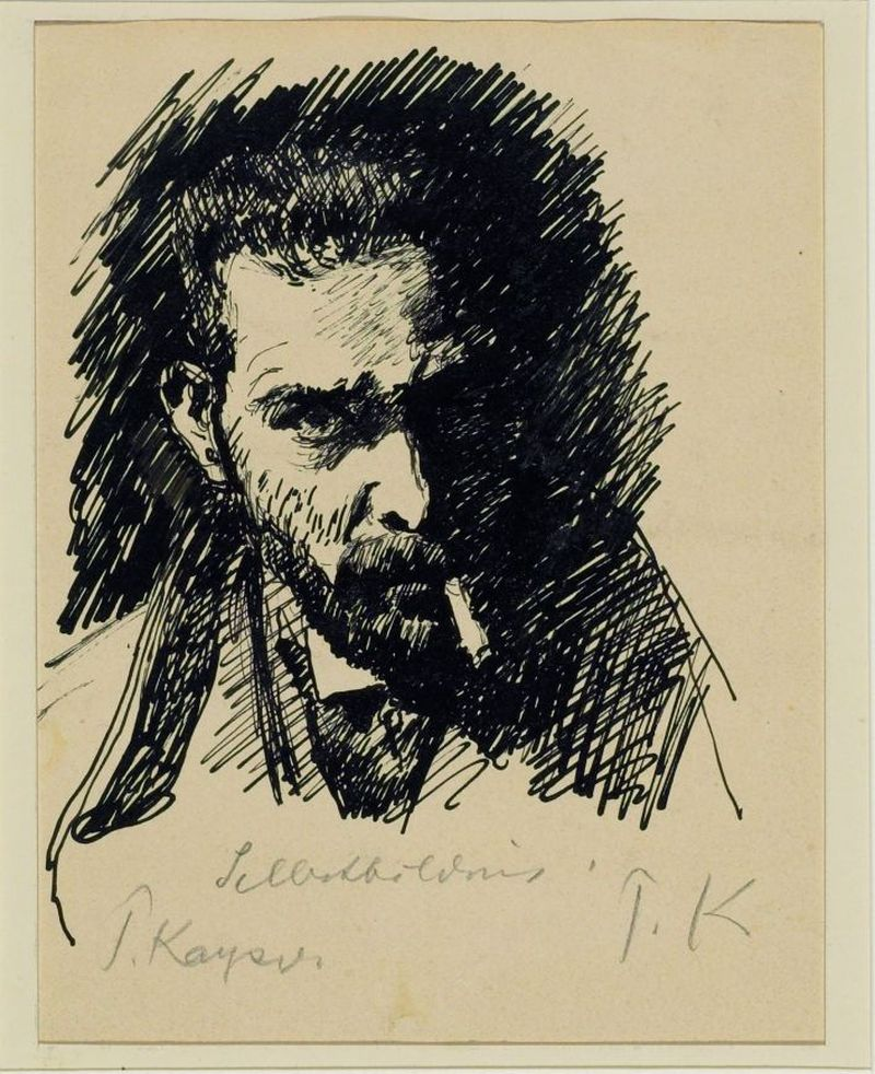 Self-portrait Rohrfederzeichnung auf Papier.